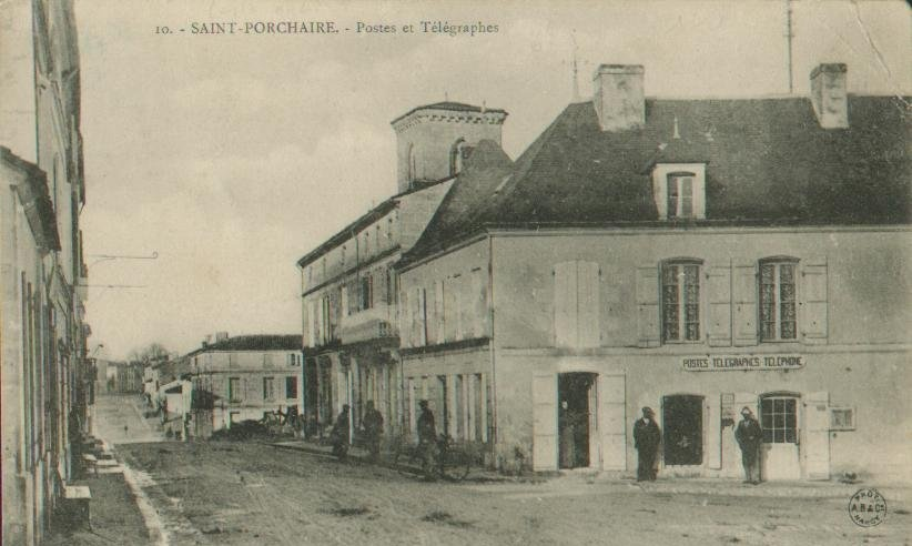 Le bourg de Saint-Porchaire en 1911